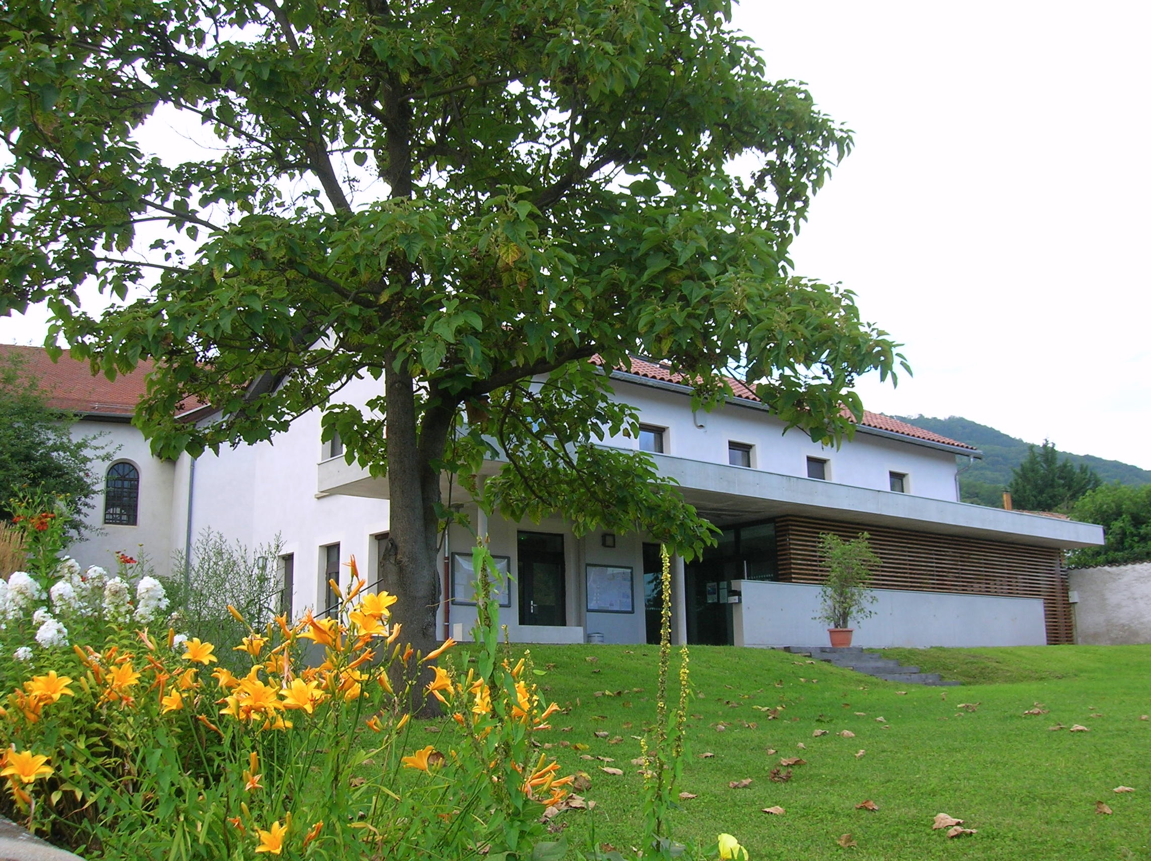 mairie d'Herbeys, Herbeys, Isère, Rhône-Alpes, France.